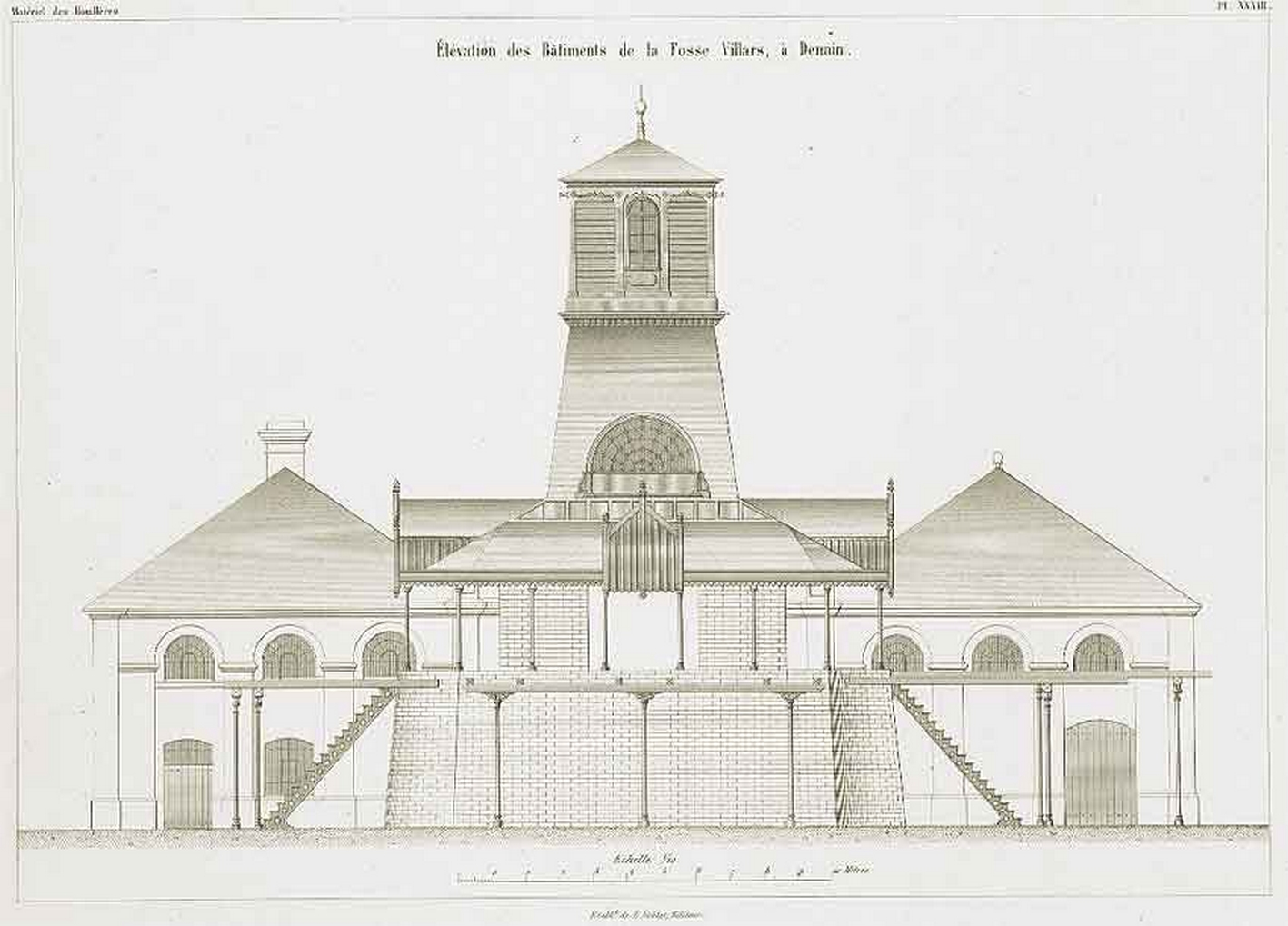 La fosse Villars de la Compagnie des mines d'Anzin était un charbonnage constitué de deux puits situé à Denain, Nord, Nord-Pas-de-Calais, France.